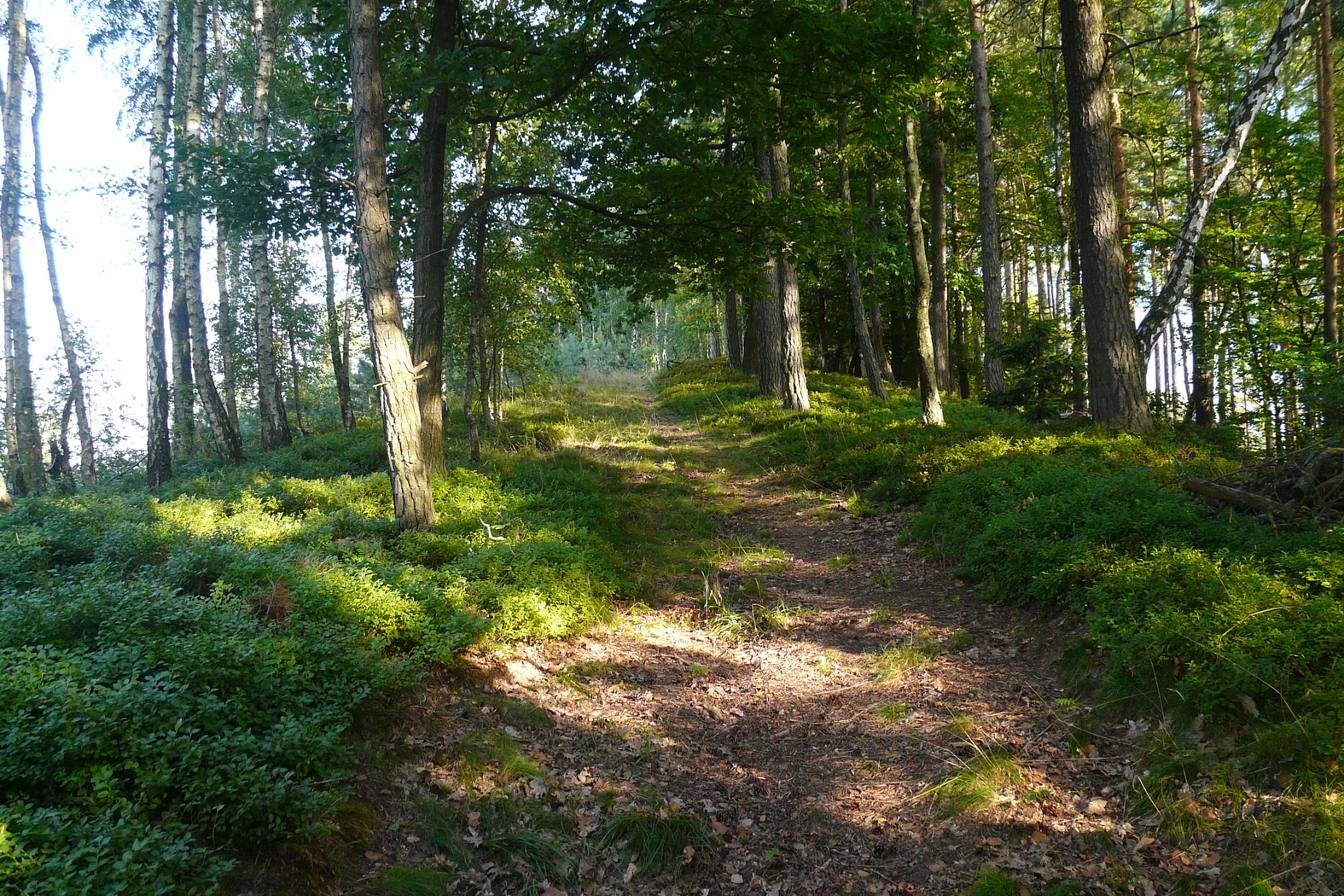 Cesta po hřebeni Bořejovského vrchu